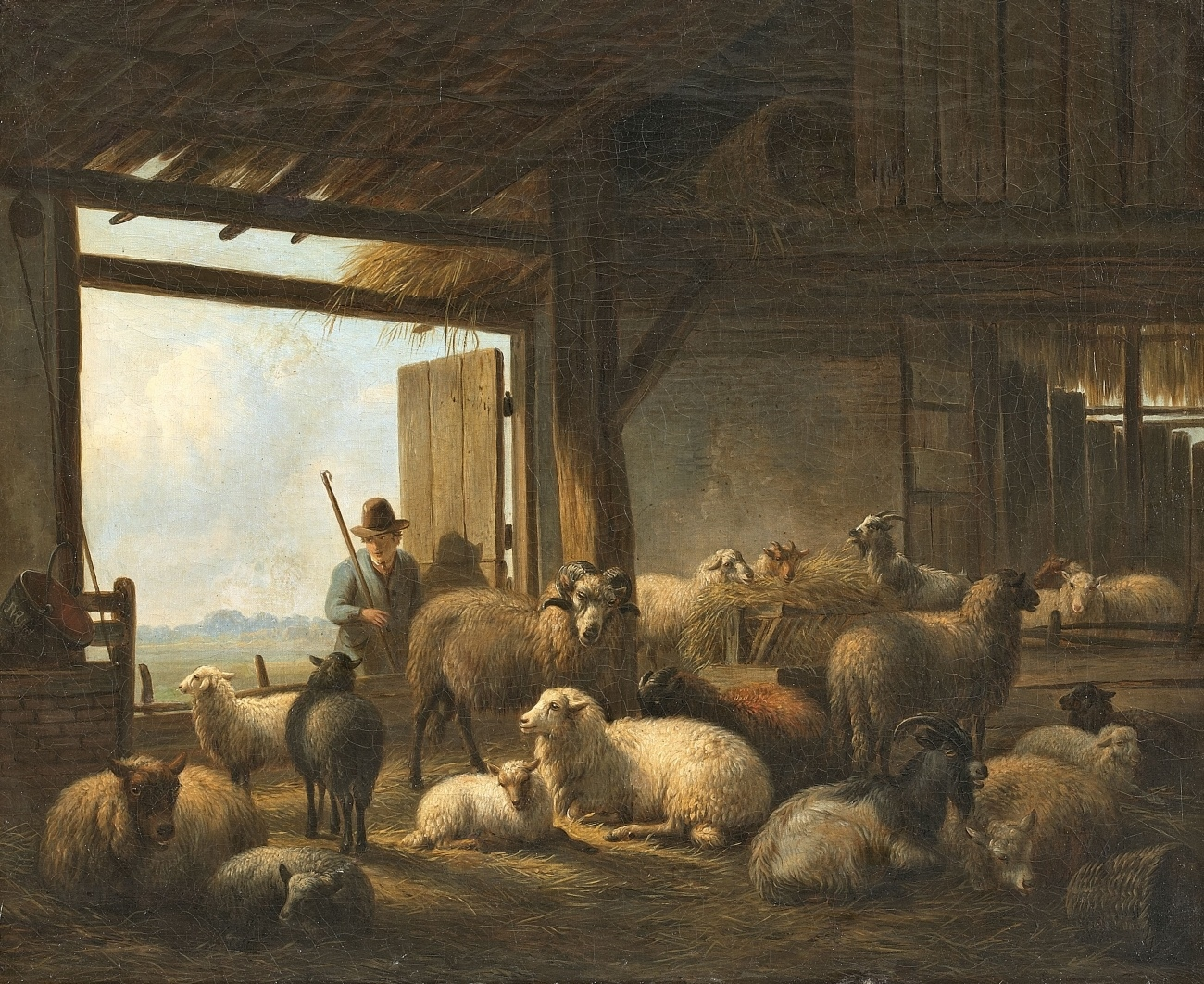 Schafstall mit Schäfer